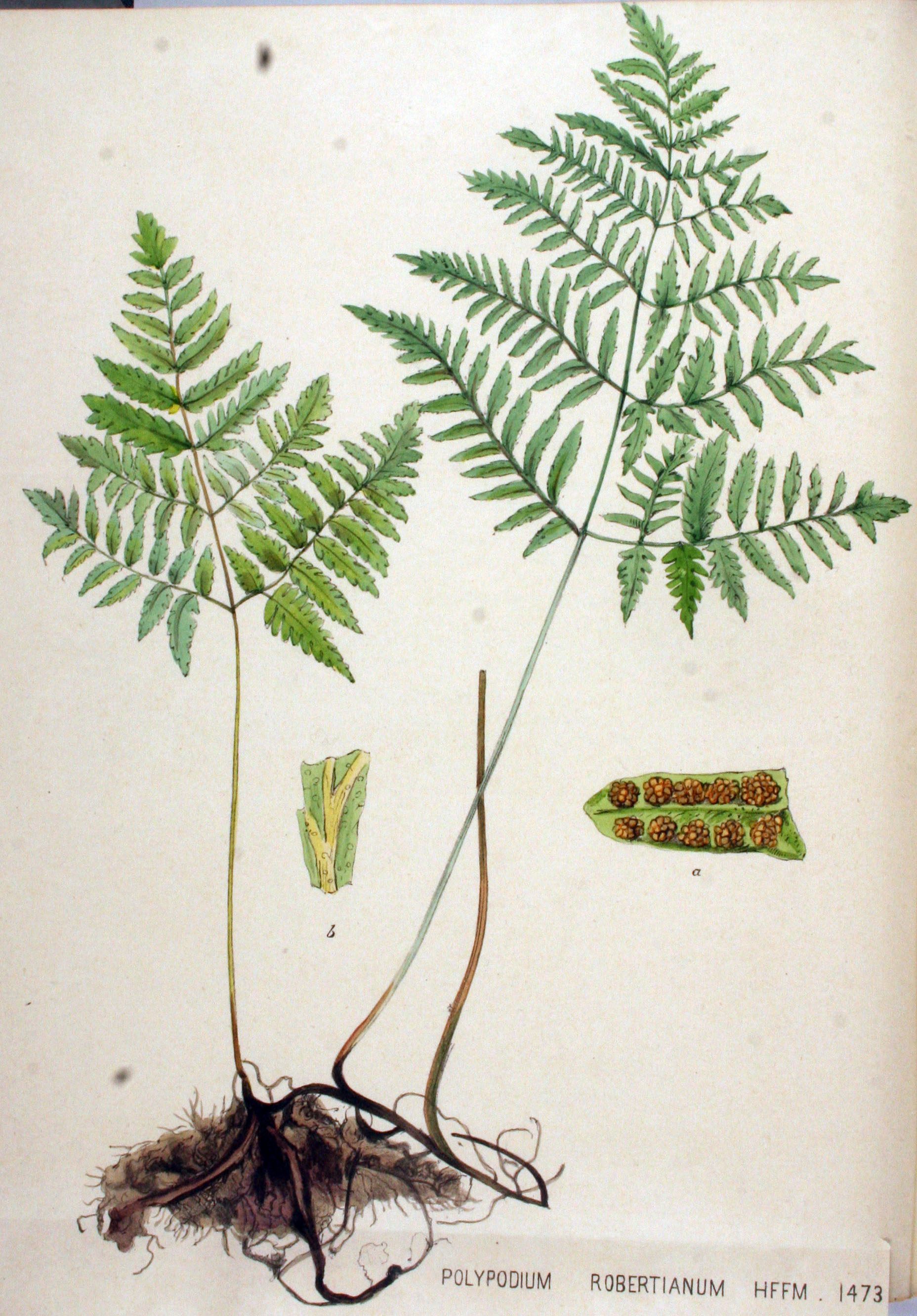 Gymnocarpiuium robertianum (Hoffmann) Newman (Syn. Polypodium robertianum Hoffmann)